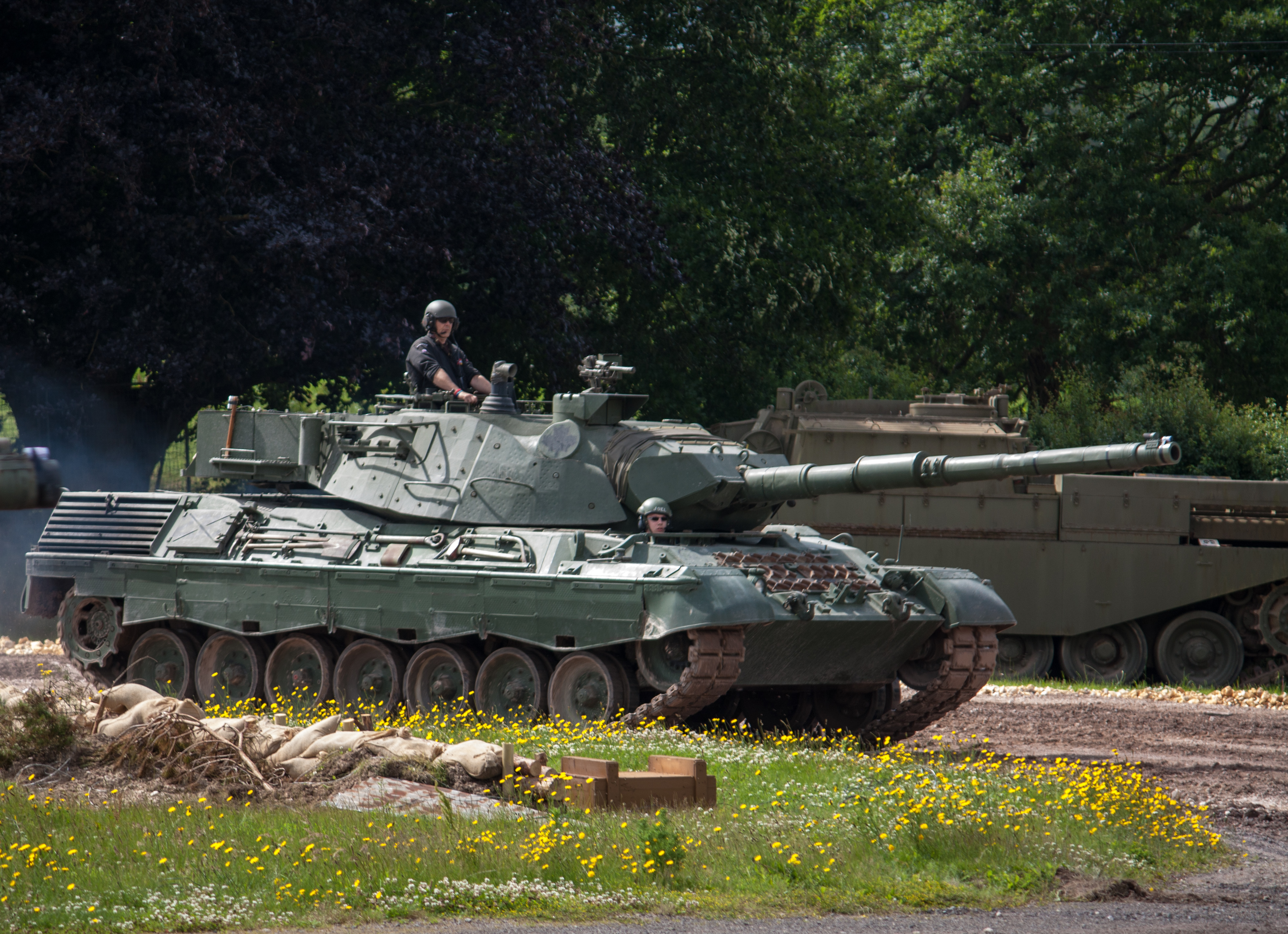 Leopard C2